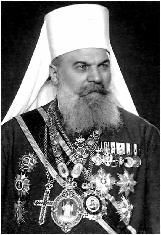 Патриарх Сербский Гавриил V